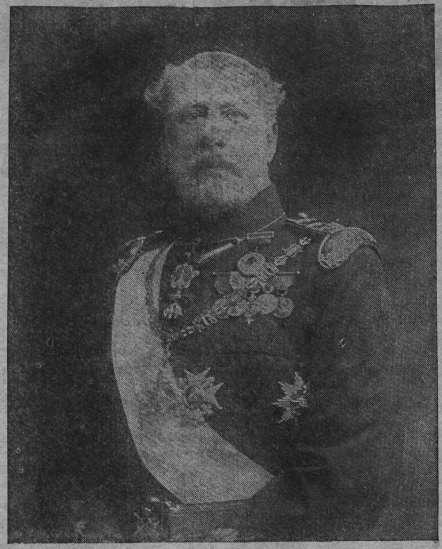 El duque de Tamames, ilustre prócer, que ha dejado de existir a las cinco de esta madrugada. (Fot. Goñi.)